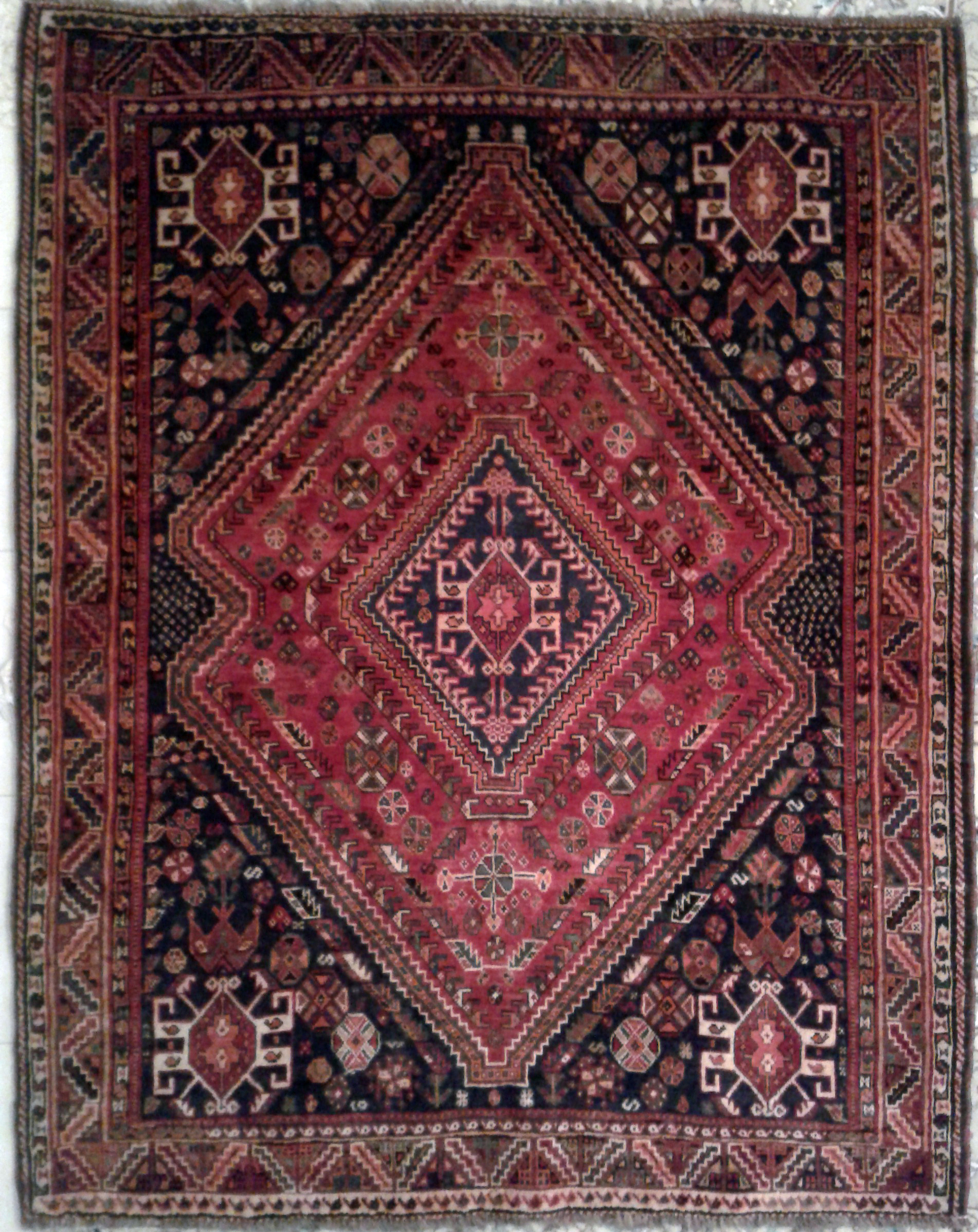 rug, marvdasht, fars, persian rug, baseri